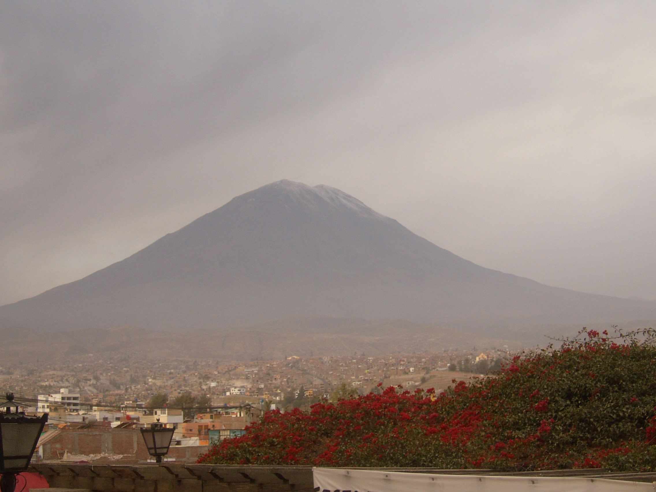 El Misti visto desde el mirador de Yanahuara en Arequipa, Perú.